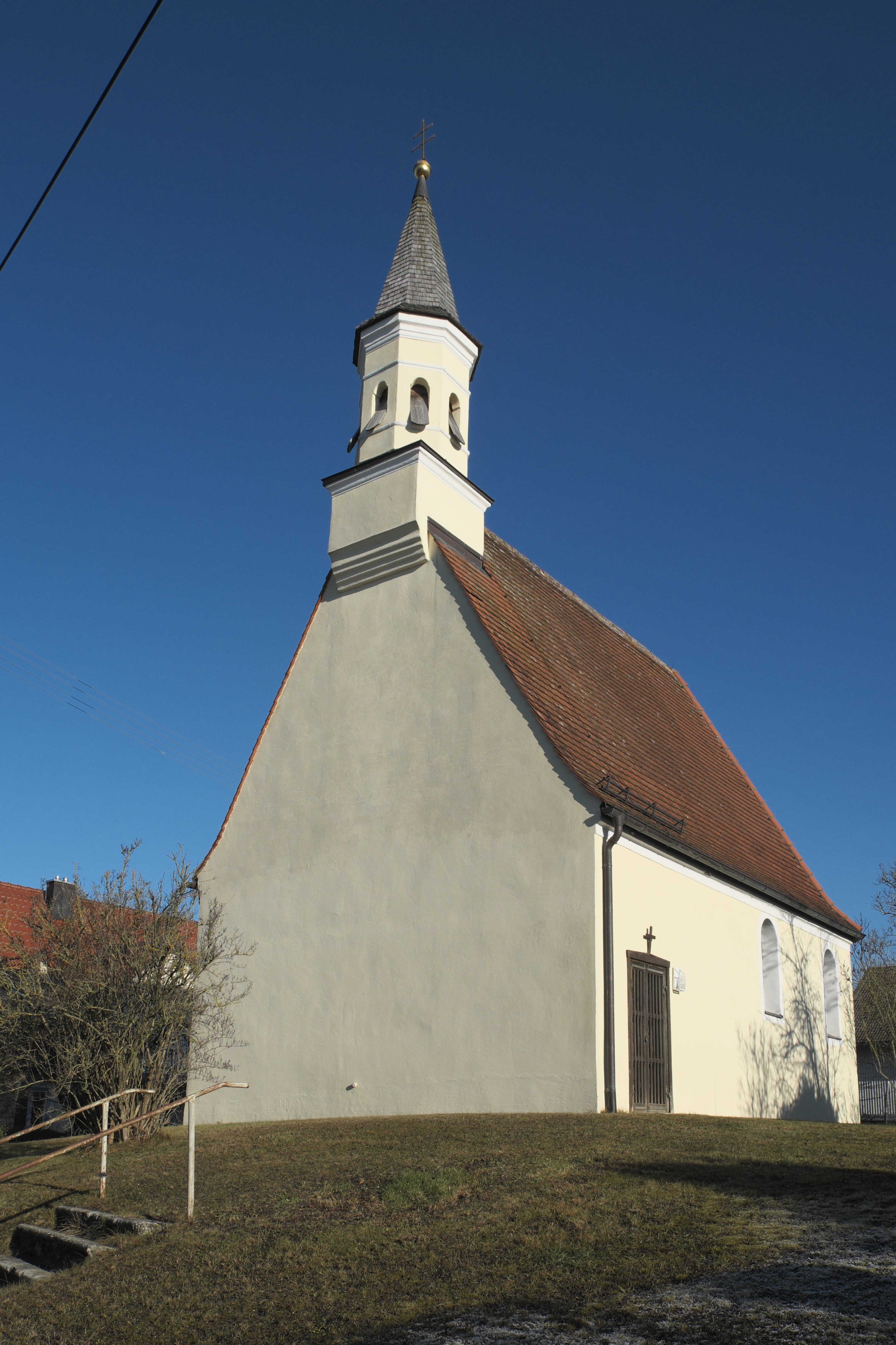 Katholische Filialkirche der Unschuldigen Kinder in Essenbach (Odelzhausen) im Landkreis Dachau (Bayern/Deutschland)